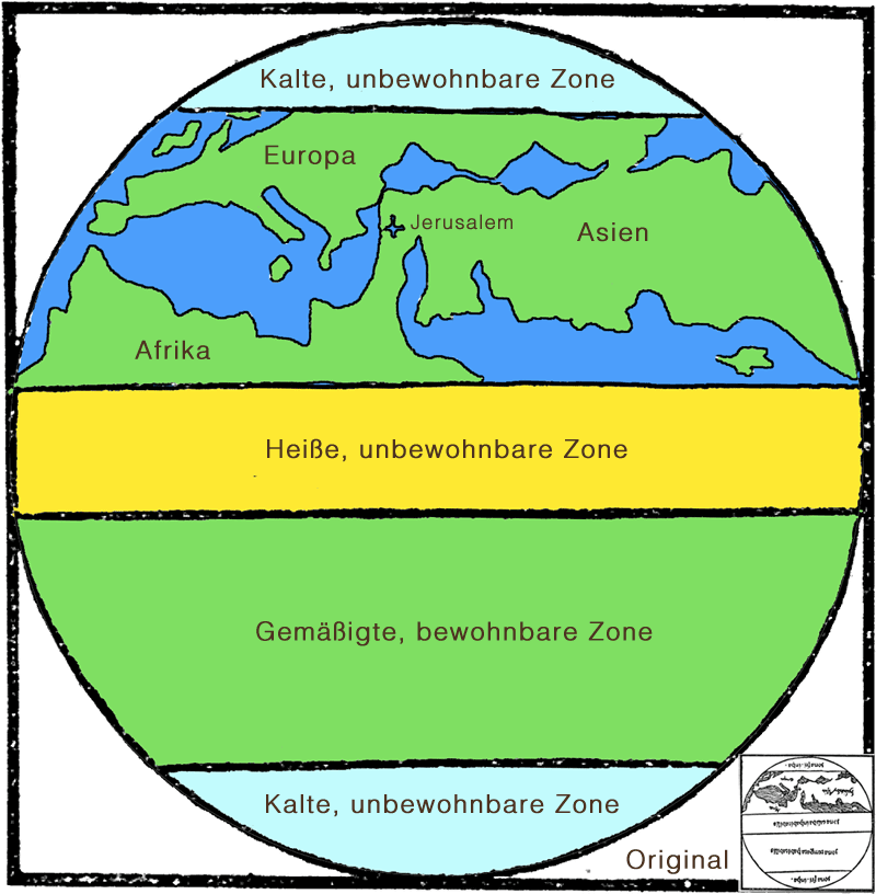 Mittelalterliches Geozonen-Modell der Erde nach der Zonen-Weltkarte des Johannes de Sacrobosco aus dem Werk "Tractatus de Sphaera", um 1230 verfasst, um 1500 in Leipzig gedruckt.